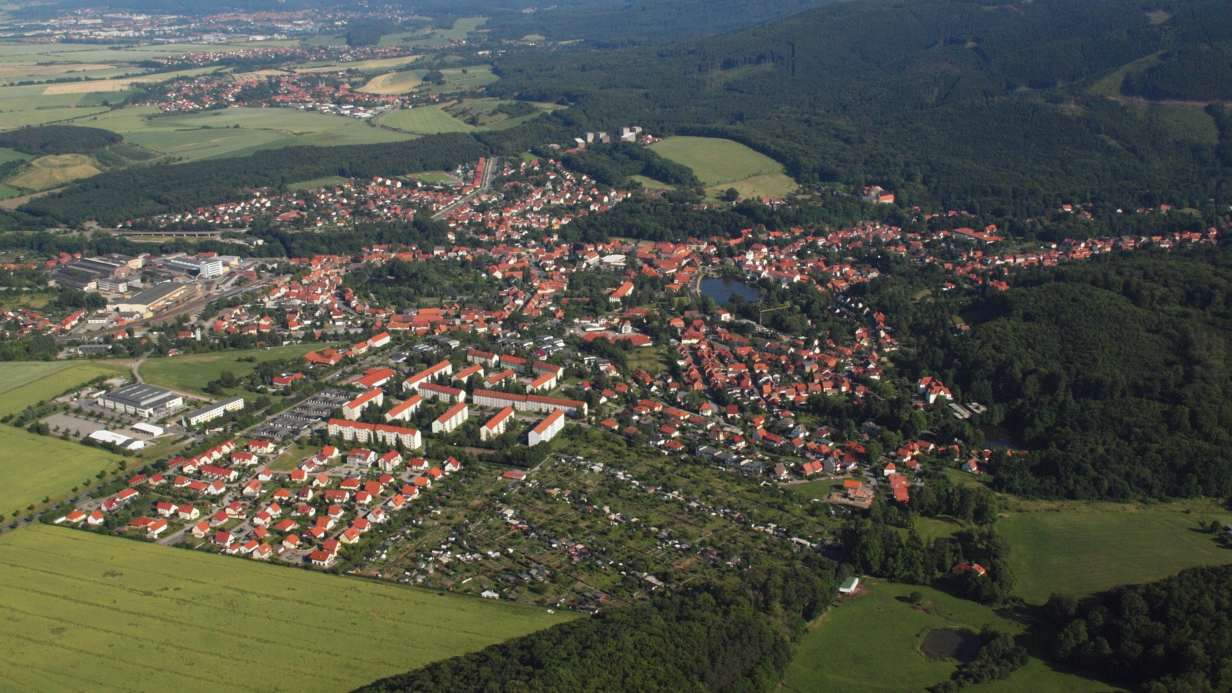 Ilsenburg (Harz): Luftaufnahme